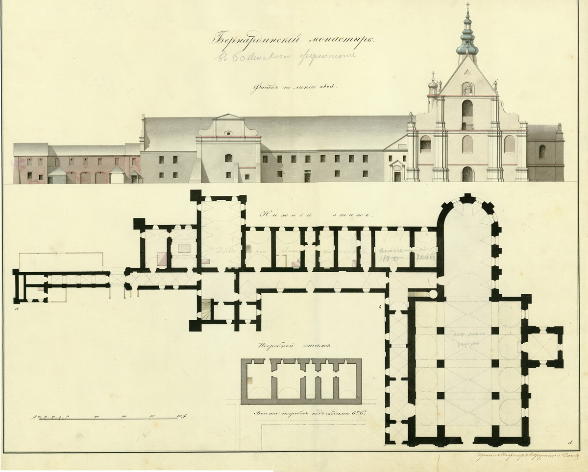 Ф. 349. Главное военно-техническое управление. Оп. 4. Д. 147. План Бернардинского монастыря. Дата: 1830 год. Кол-во листов: 1 60 х 60 см М: в 1 дюйме 20 футов